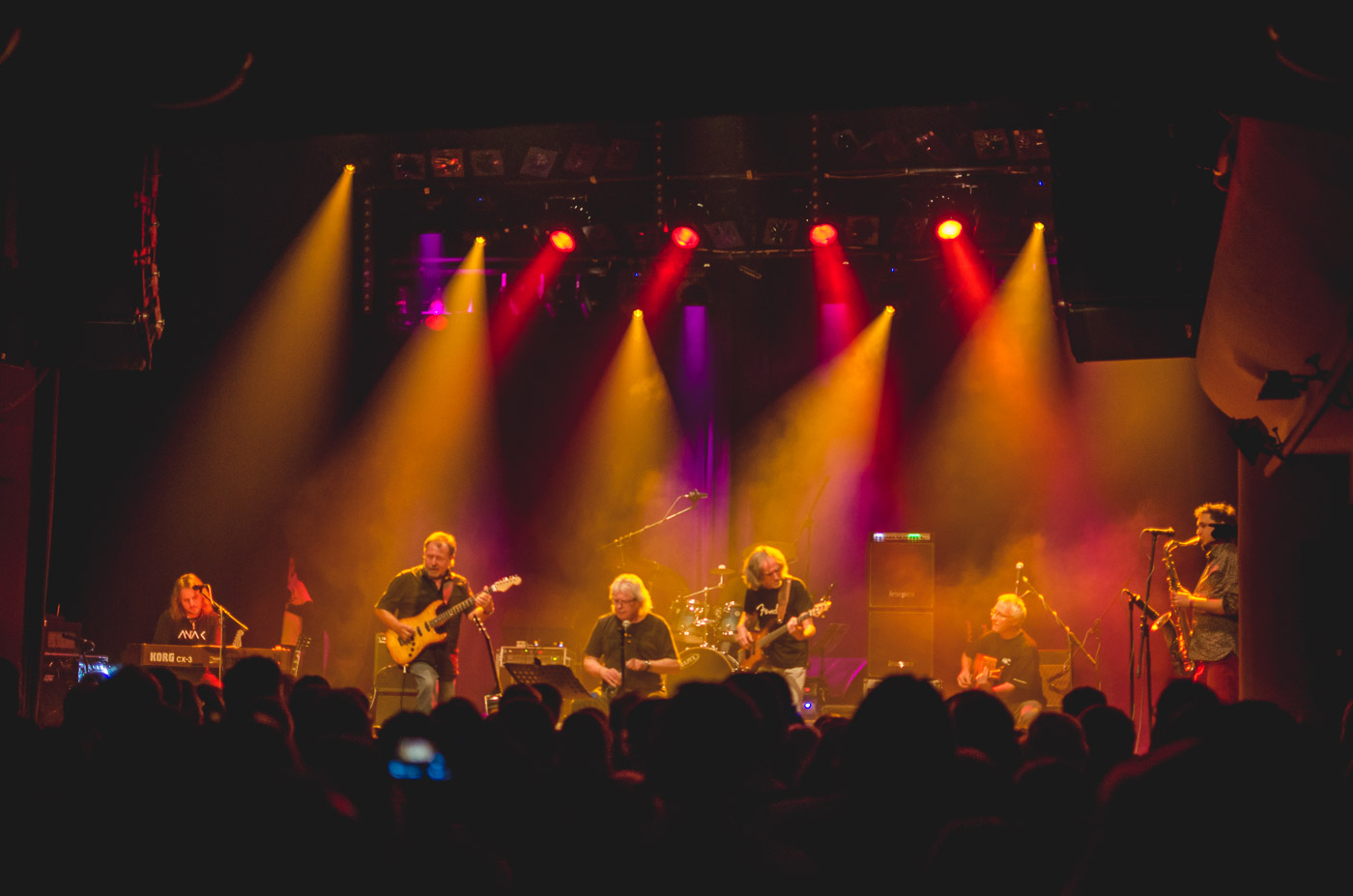 Koncert obnovené kapely Flamengo v Paláci Akropolis 19.10.2015